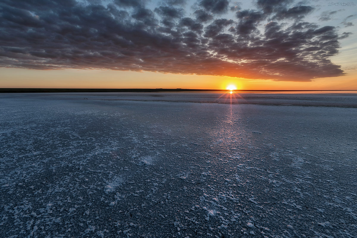 Ростовский заповедник: в центральной части Кума-Манычской впадины, к северу от оз. Маныч-Гудило, в Орловском и Ремонтнеском районах Ростовской области, Орловский район, Ремонтненский район, Ростовская область This image is related to the protected area of Russia number 6100108